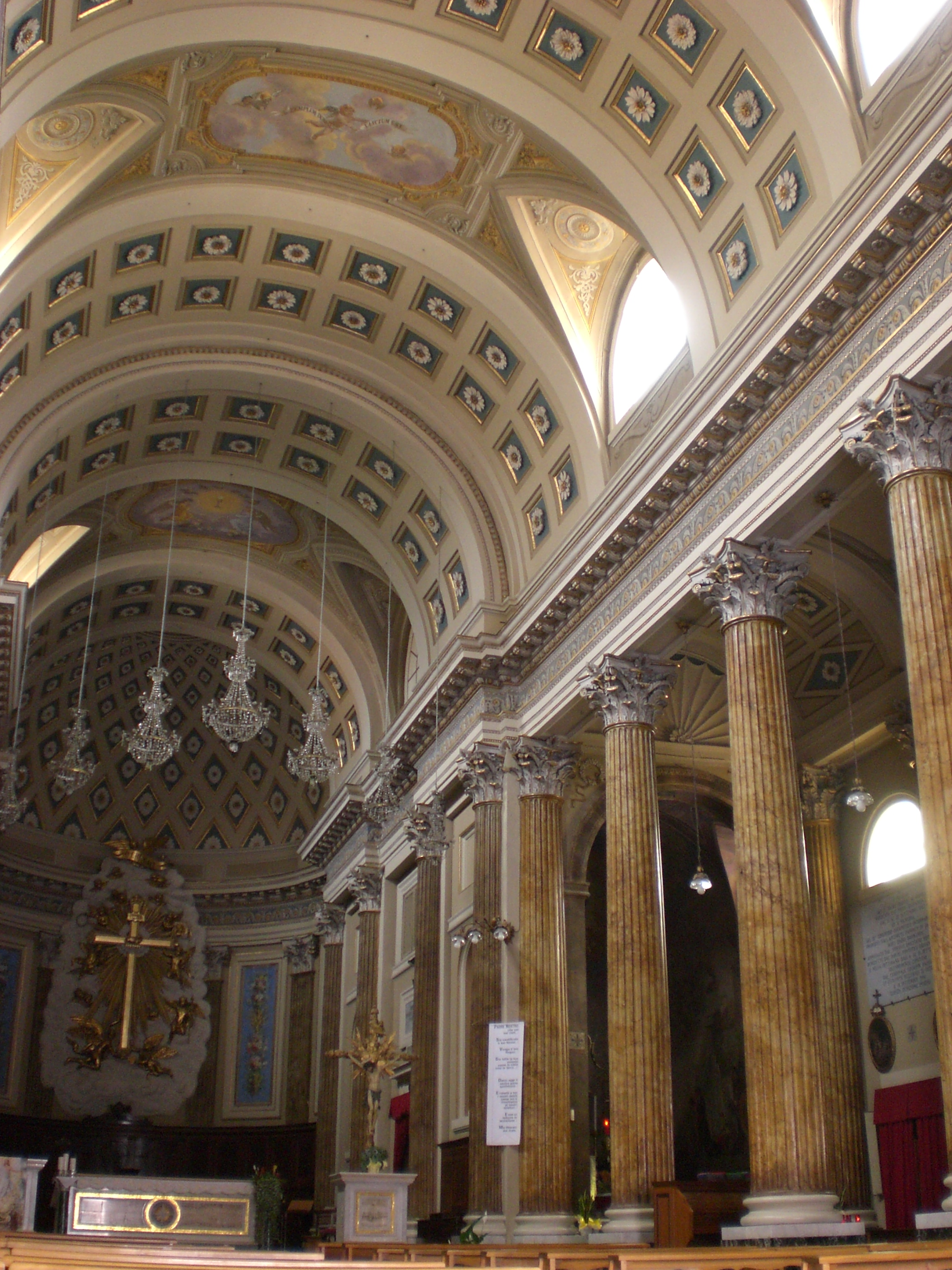 Ostra, Basilica Collegiata di Santa Croce, 1848-51